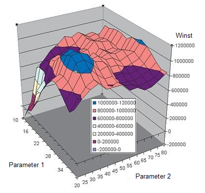 Optimalisatie grafiek in 3D van een tradingsysteem. De 2 parameters zijn de beide horizontale assen. De behaalde winst is afgebeeld op de verticale as.